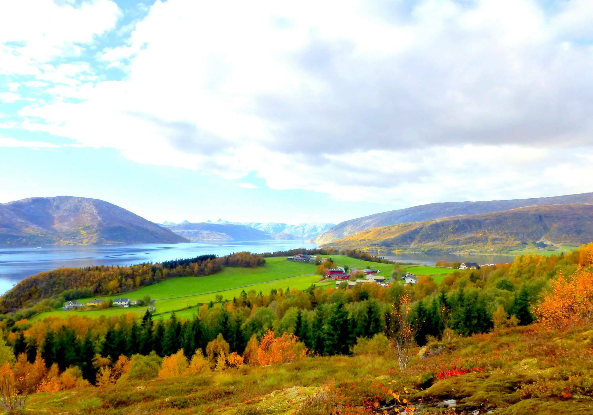 Lindsetgårdene sett ovenfra